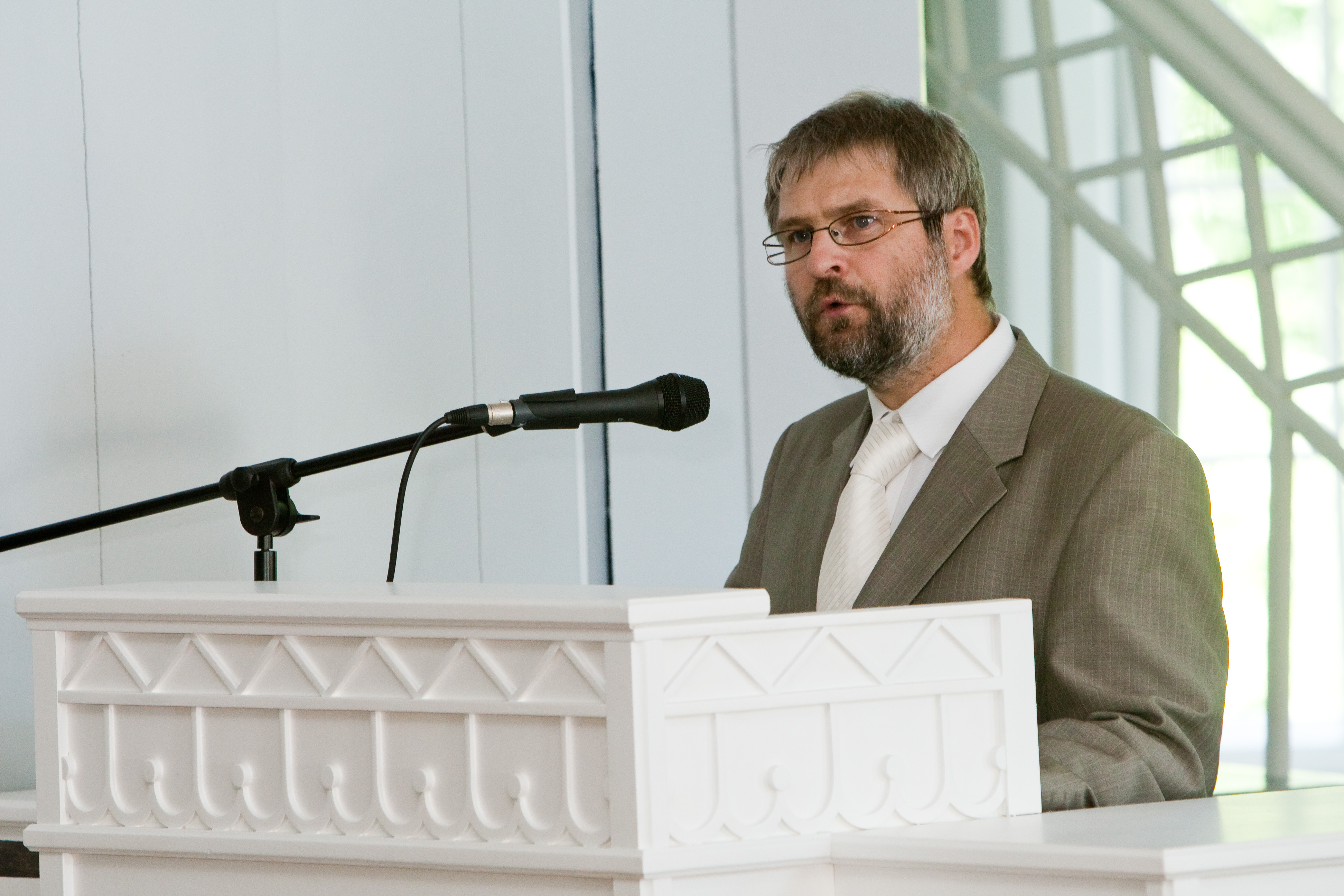 Tartu Ülikooli ajaloo ja arheoloogia instituudi bakalaureuseõppe lõpuaktus TÜ ajaloo muuseumi valges saalis 29. juunil 2010. Ajaloo ja arheoloogia instituudi juhataja professor Aivar Kriiska.